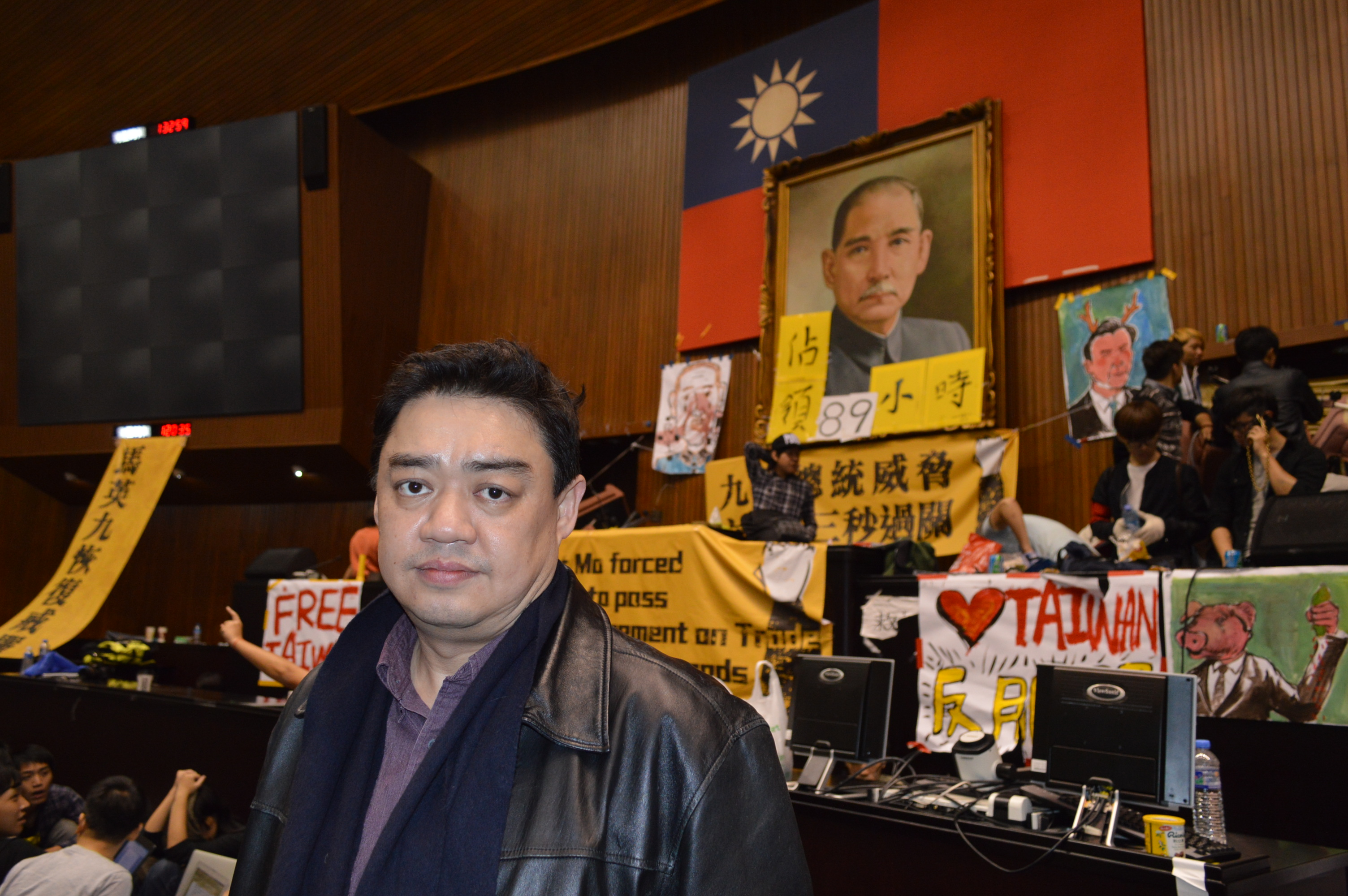 吾爾開希3月21日淩晨在立法院學生抗議現場。